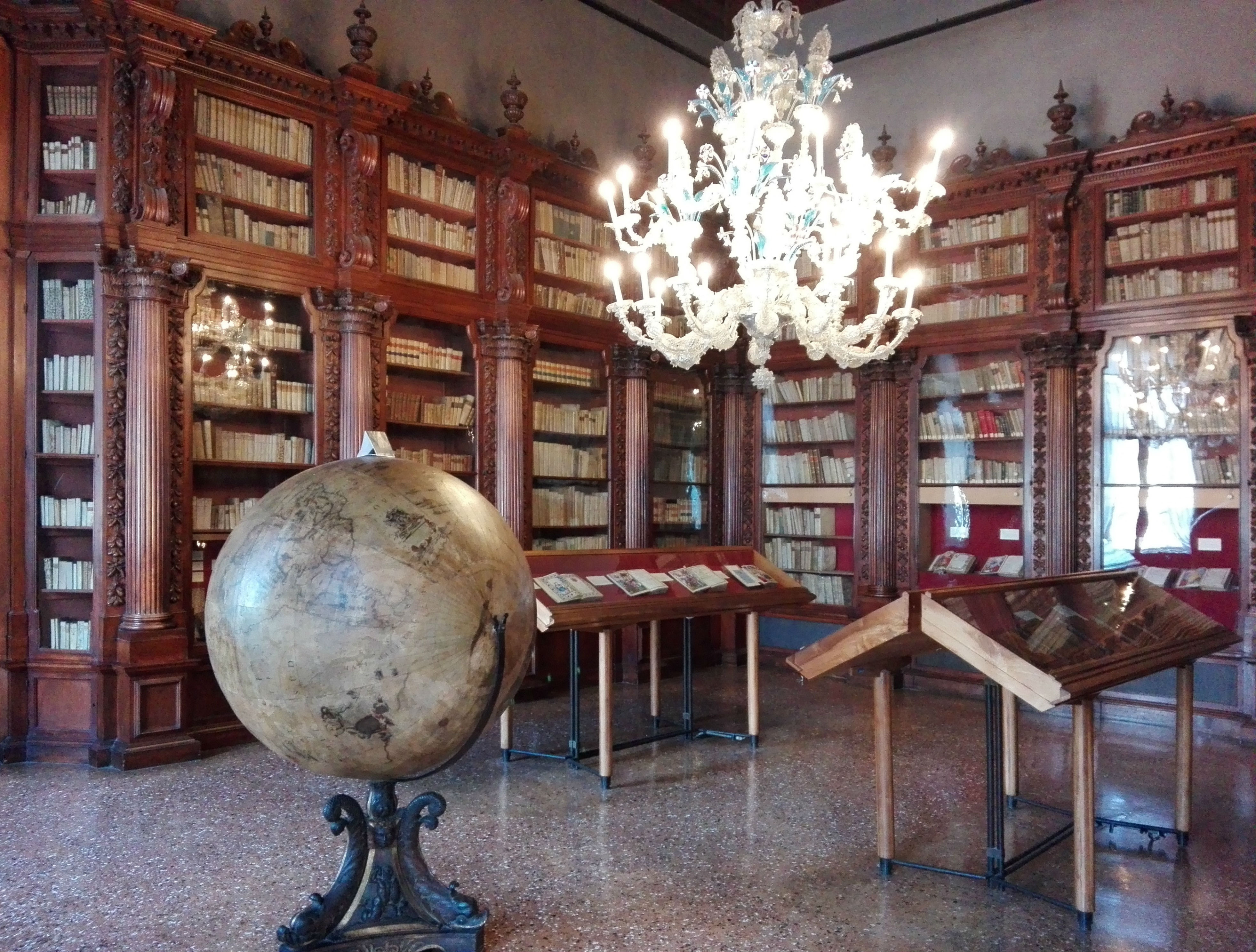 Libreria della famiglia Pisani al Museo Correr